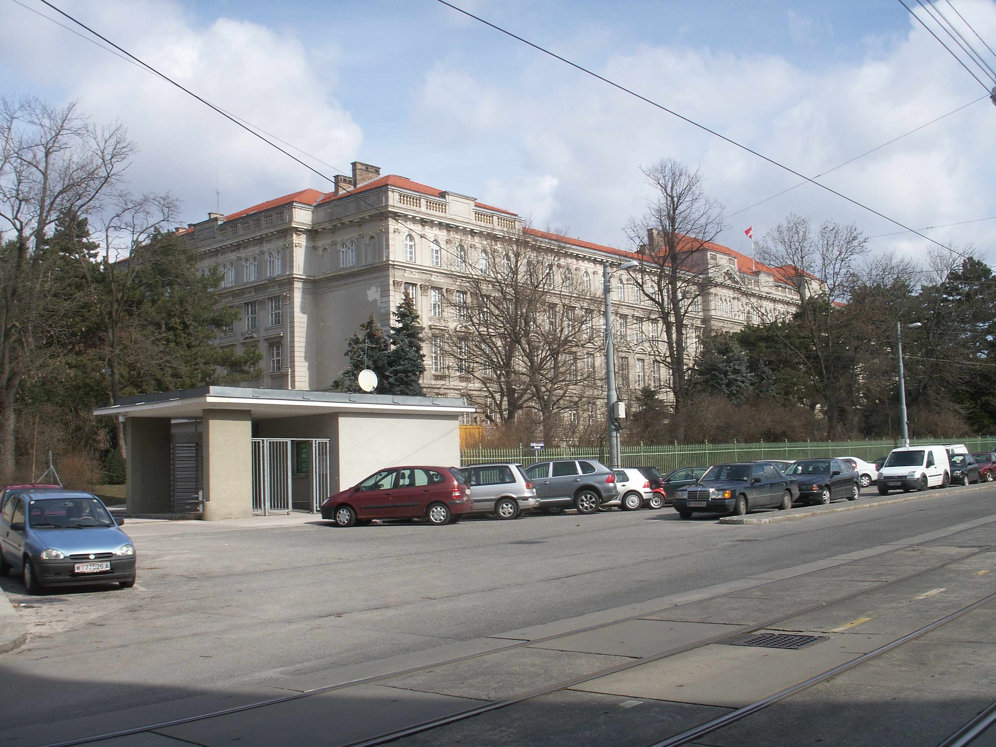 Kommandogebäude Theodor Körner (Breitenseer Kommandogebäude) Wien 14., Hütteldorferstraße